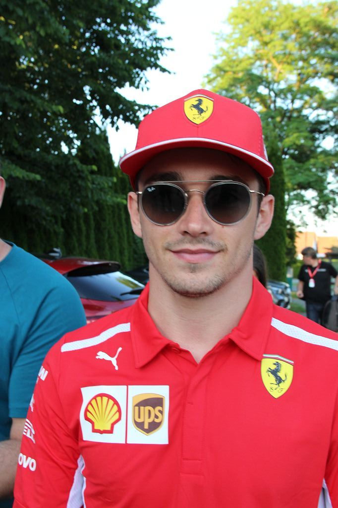 Formula 1 2019 / Schloss Gabelhofen